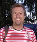 Jacob Christoffersen, jazz-musiker, pianist